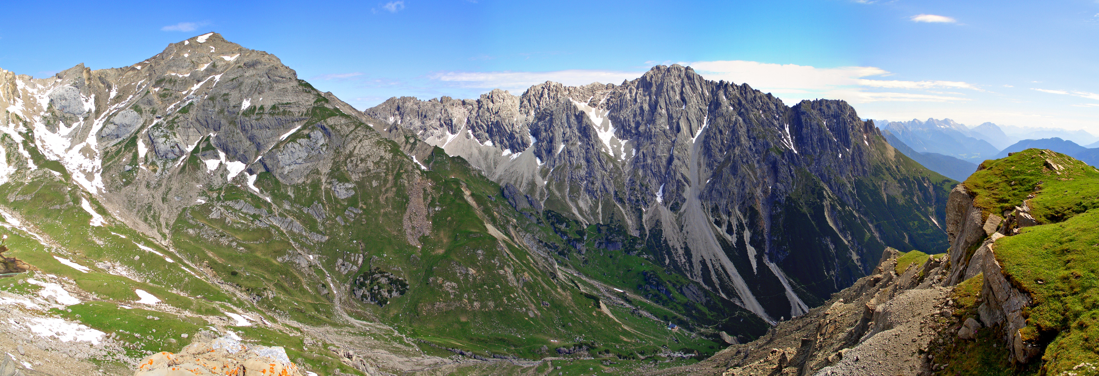 Panorama vom Hinteren Alpjoch